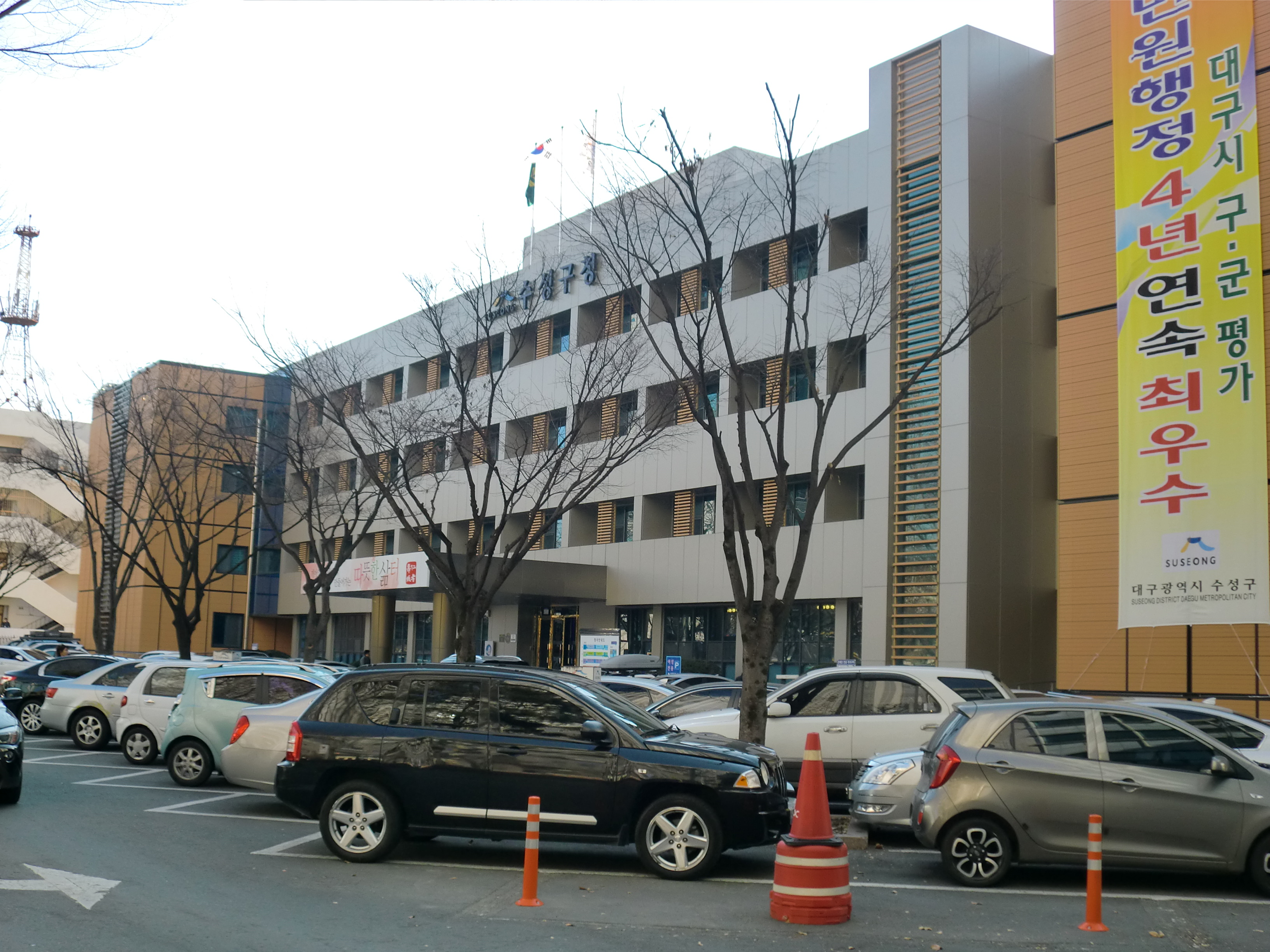 대구광역시 수성구에 있는 수성구청